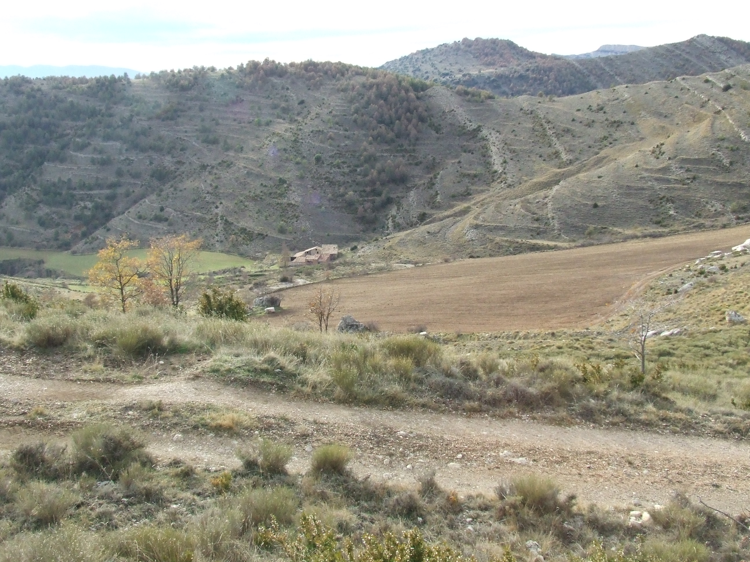 La Torre d'Eroles (Abella de la Conca, Pallars Jussà)